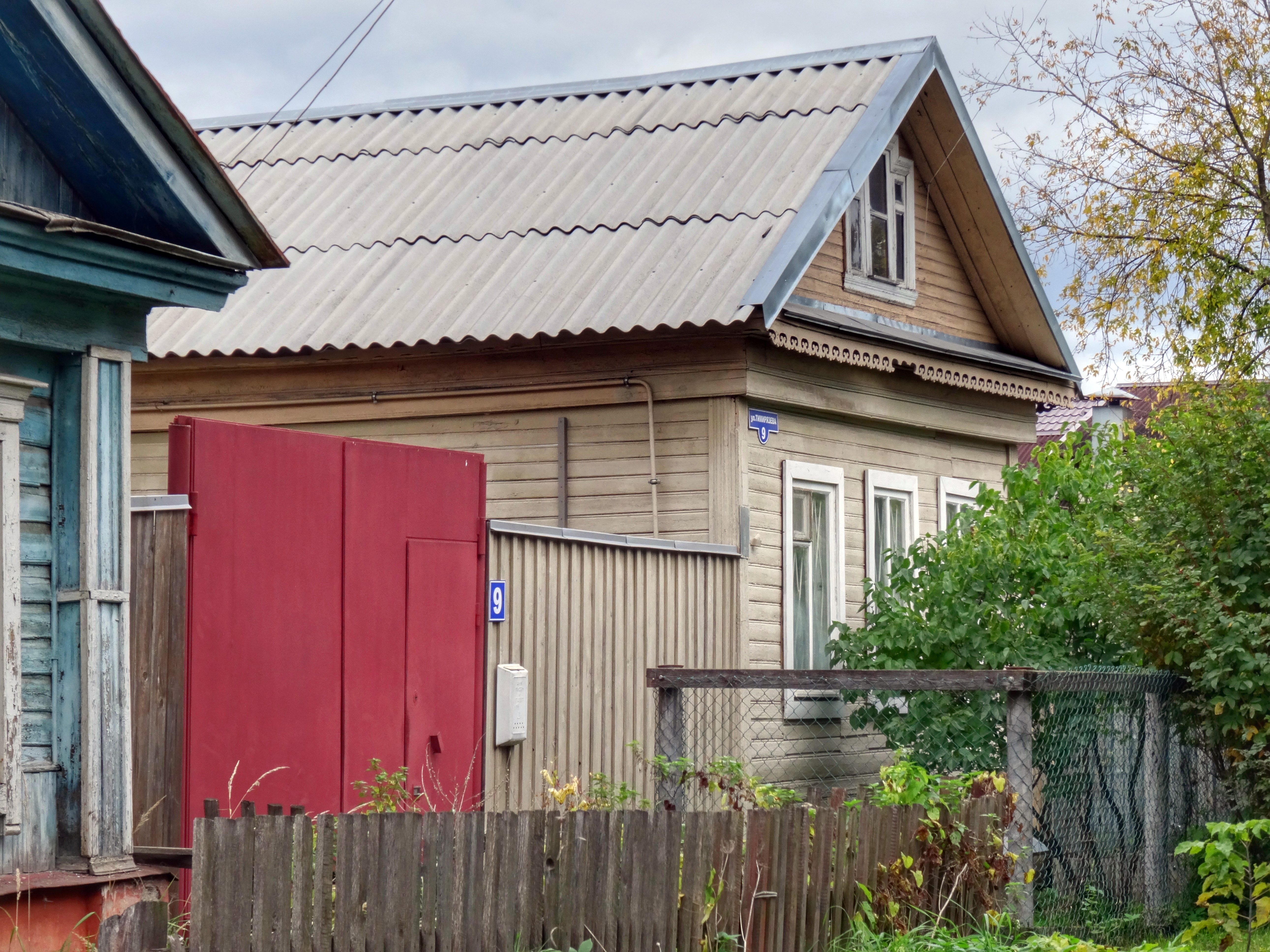 Дом, в котором жил И.А.Трусов - активный участник Октябрьской революции и гражданской войны: переулок Тимирязевский, 9, Тверь, Тверская область